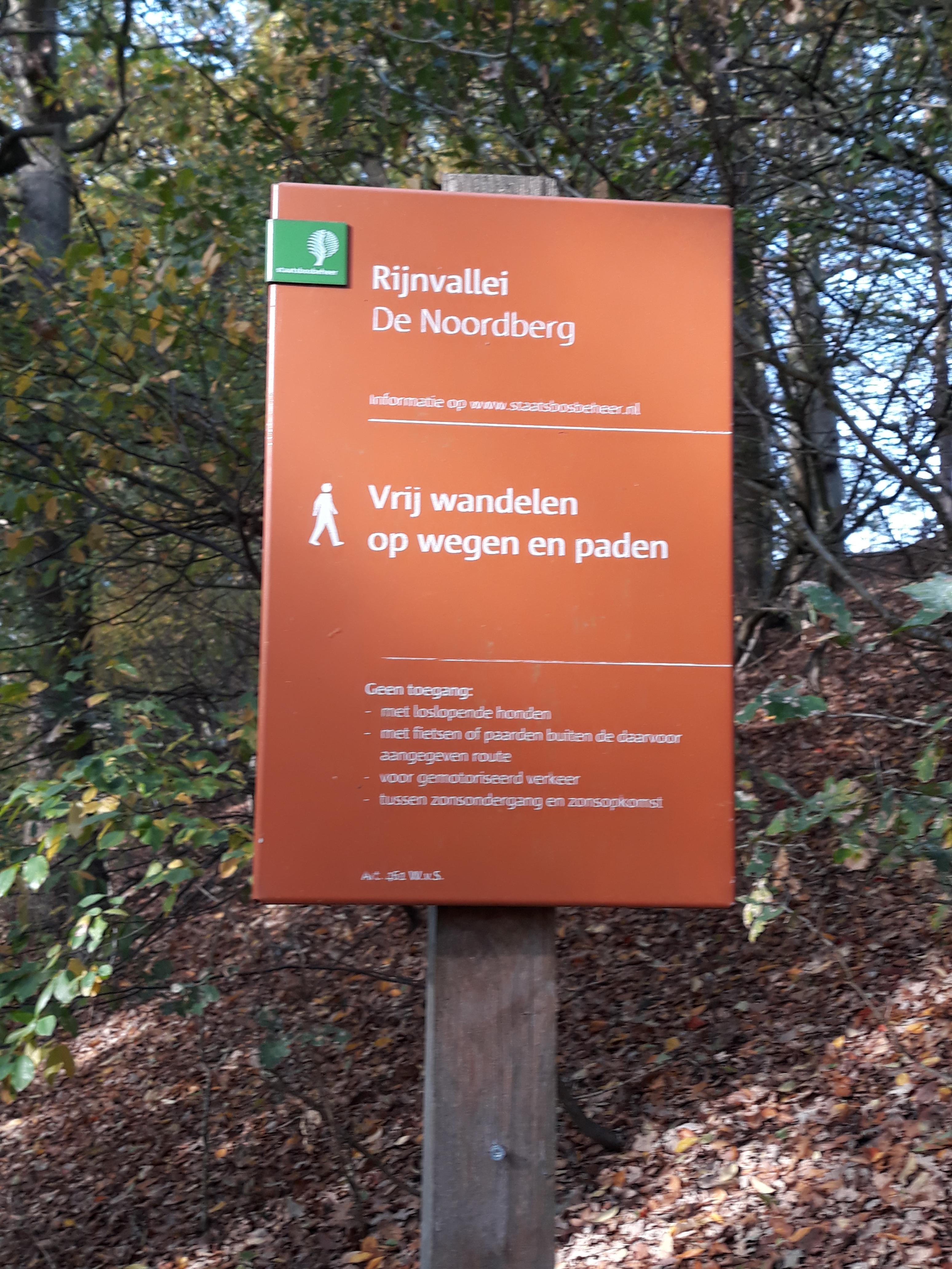 Toegangsbordje SBB De Noordberg